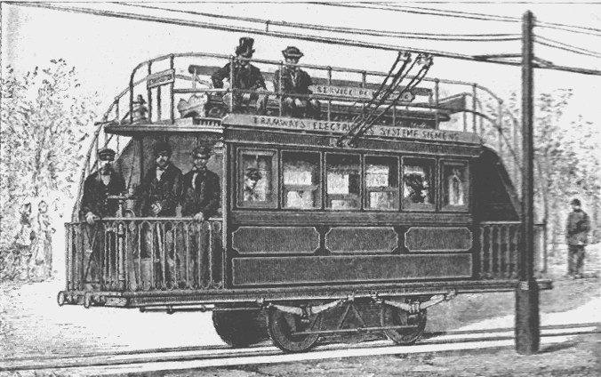 Erste Überkopf-Fahrstromversorgung in Paris 1881